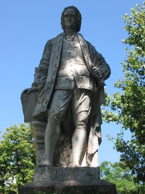 Estatua de José Quer y Martínez en el Real Jardín Botánico de Madrid. Esculpida por Andrés Rodríguez (1829–¿?) en 1866.